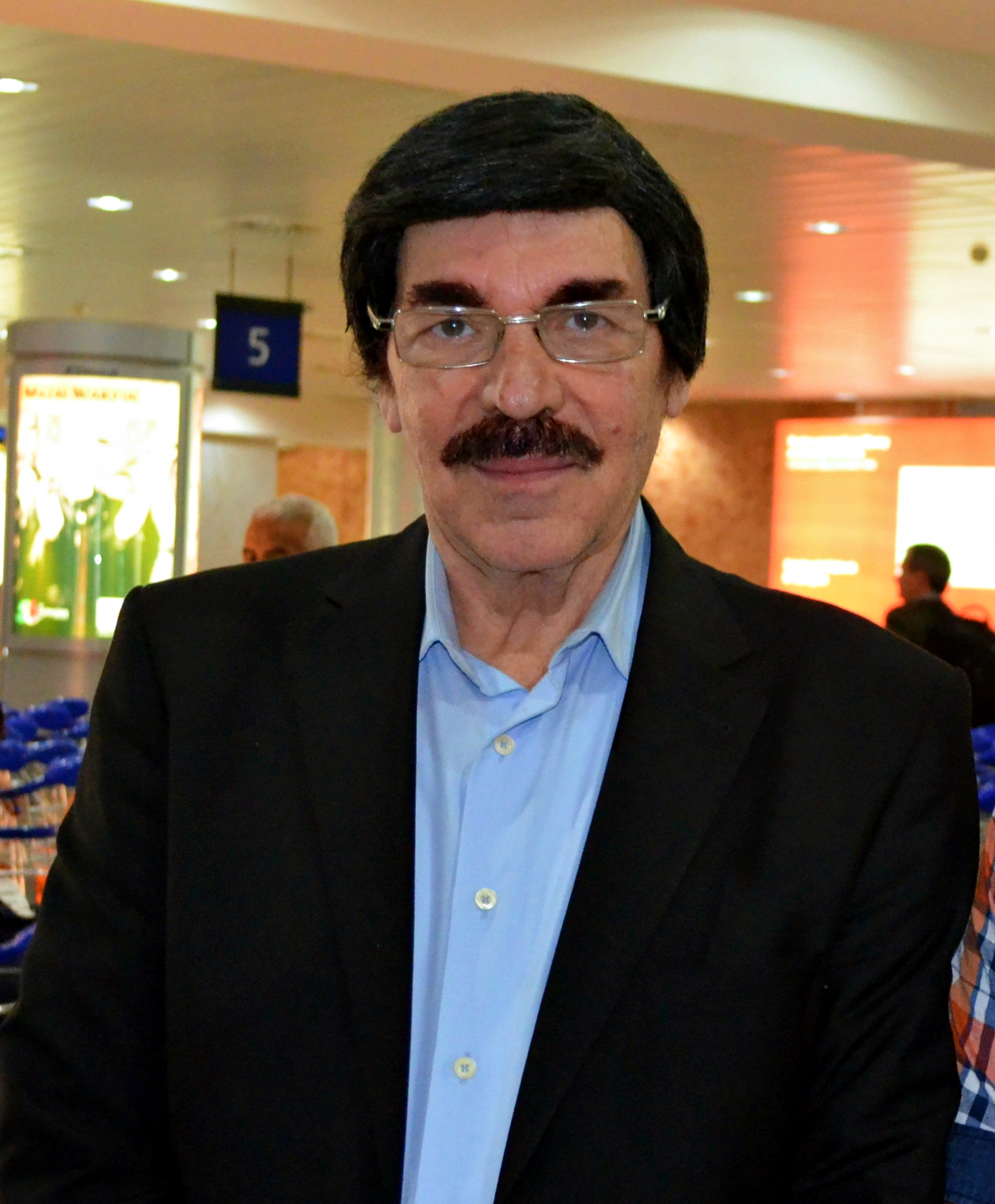 الفنان السوري ياسر العظمة في مطار هواري بو مدين بالجزائر.